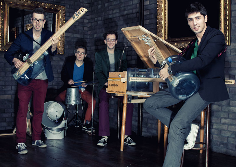 Recycling Band, Poland